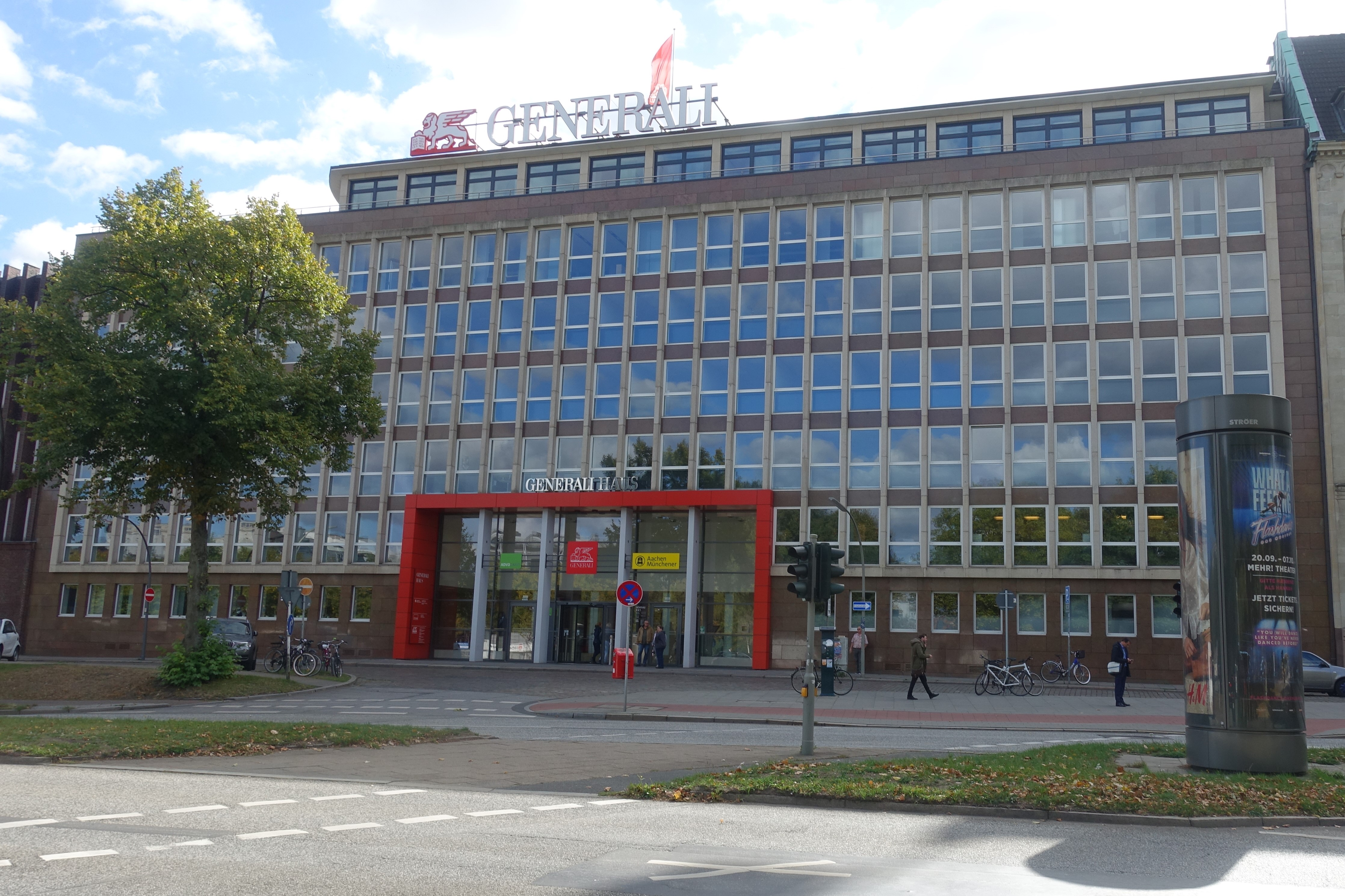 Früheres Veerwaltungsgebäude der Volksfürsorge am Besenbinderhof - Jetzt Generali Haus